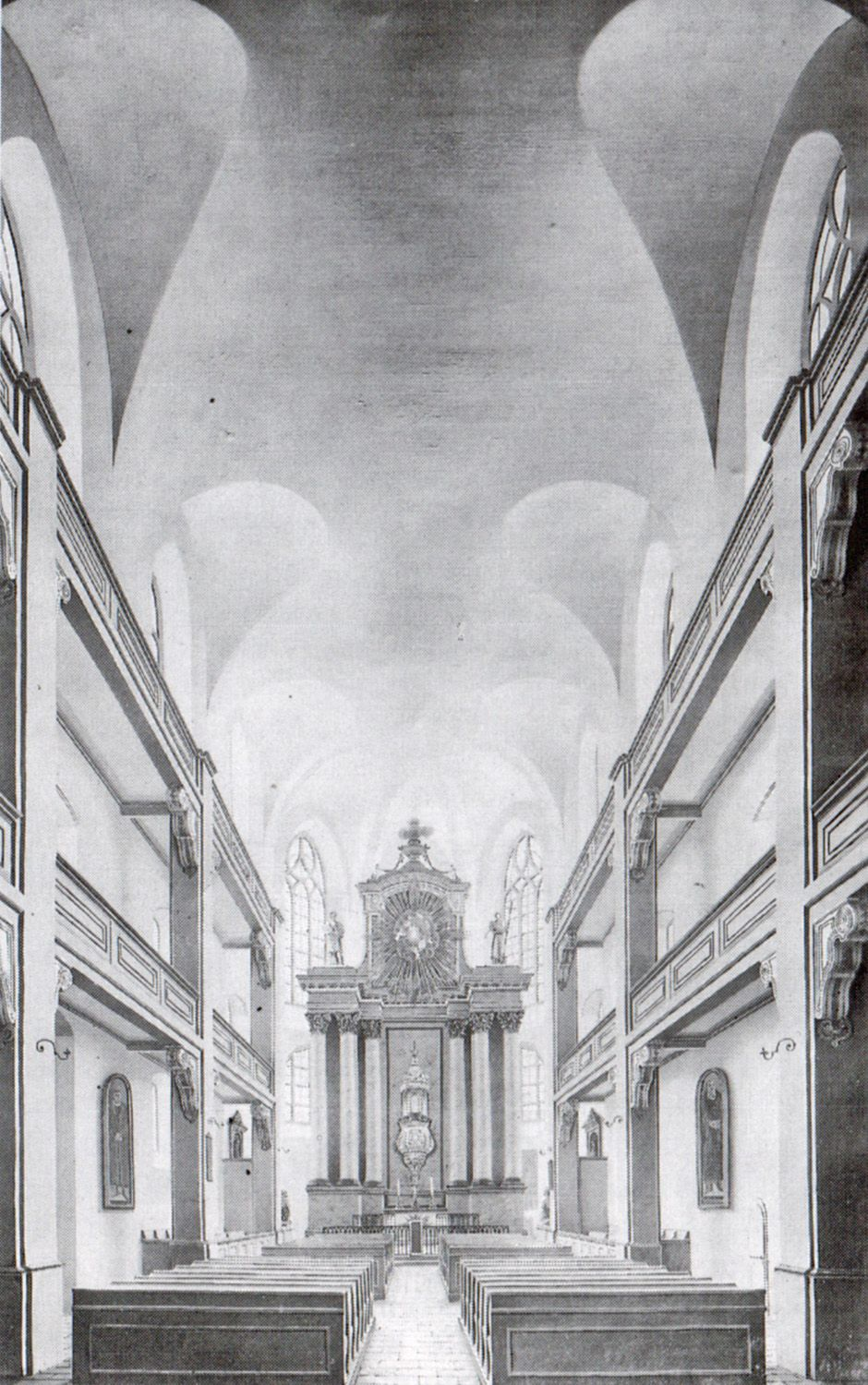 Das Innere der Wittenberger Schlosskirche 1832